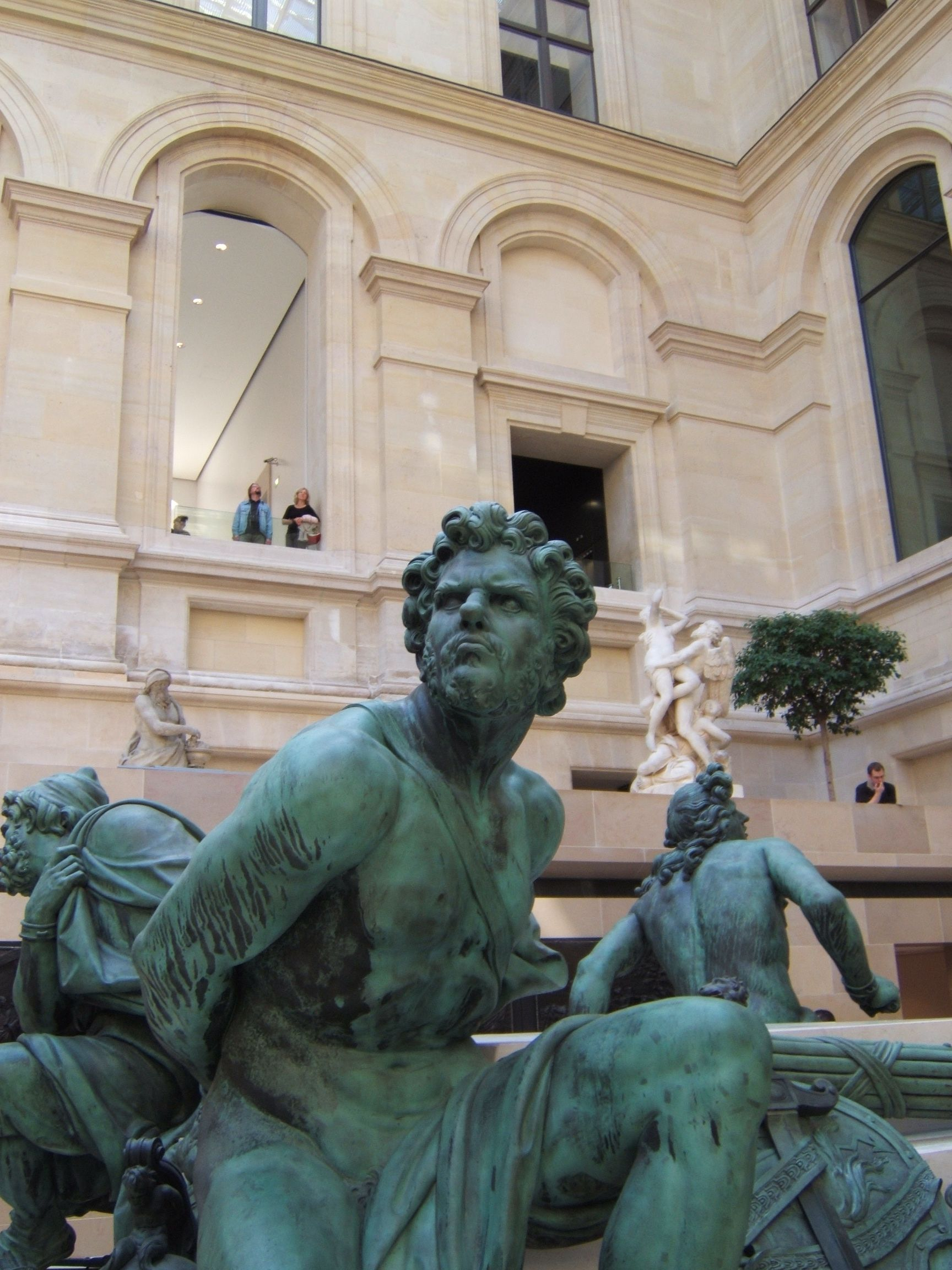 Part Of Statue 4 captives, Louvre Paris